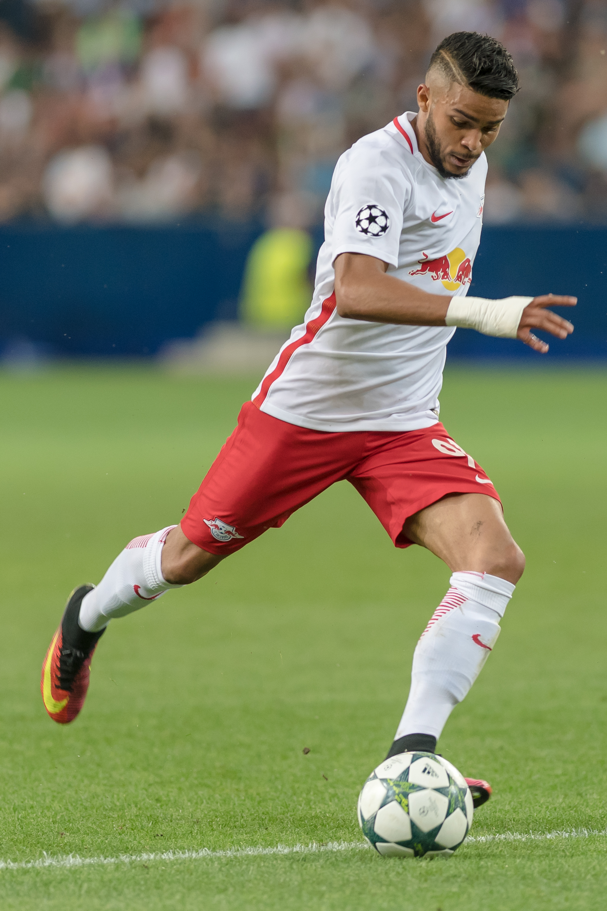 UEFA Champions League - Play-Offs - FC Salzburg vs Dinamo Zagreb. Bild zeigt Wanderson (RBS).